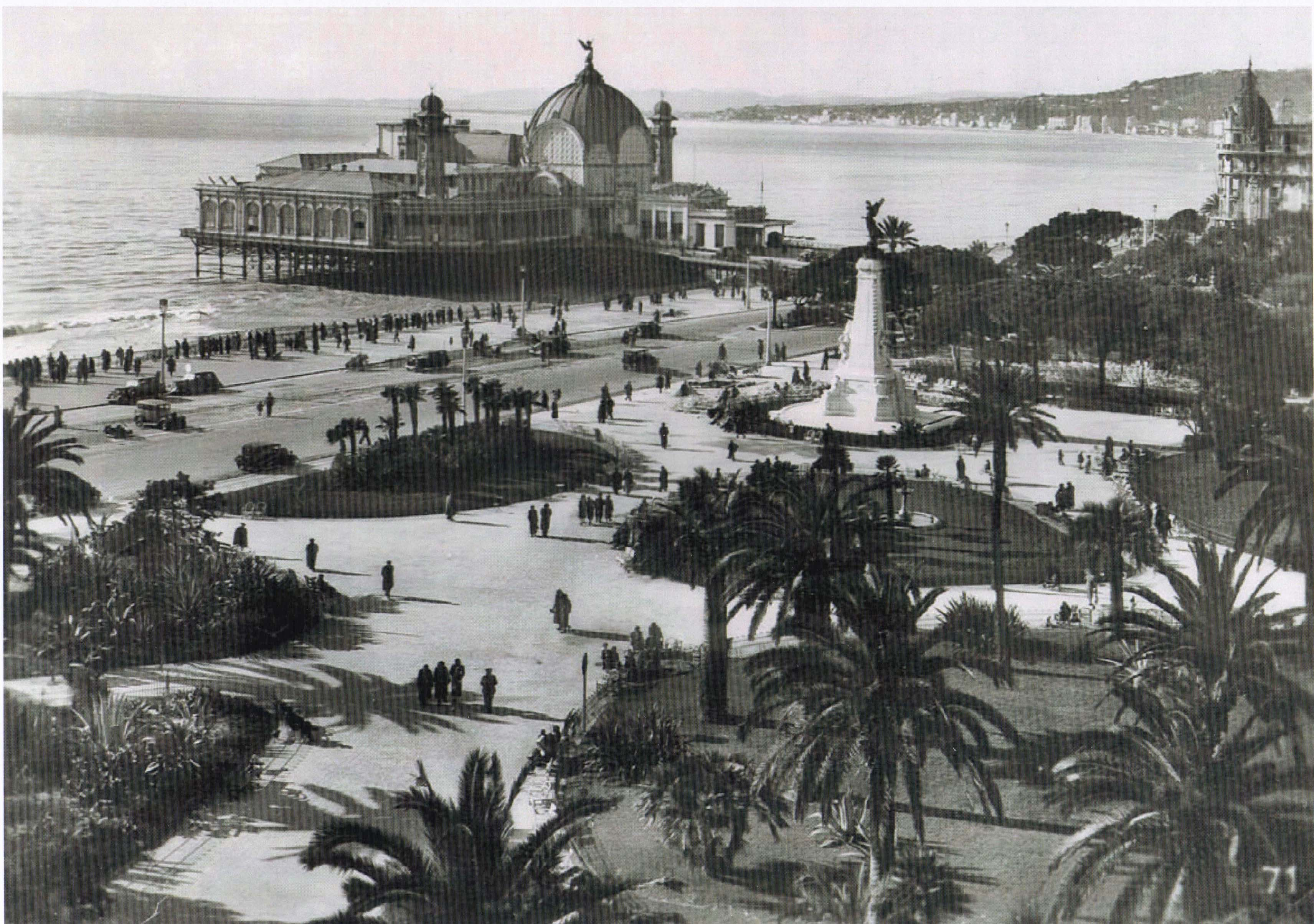 Les jardins Albert 1er et la Promenade des Anglais avec en arrière plan le Casino Jetée et la Baie : Collection particulière Frédérique Coppin.